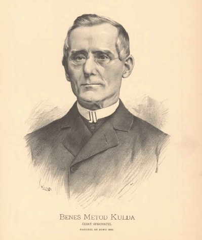 Portréty českých osobností od Jana Vilímka